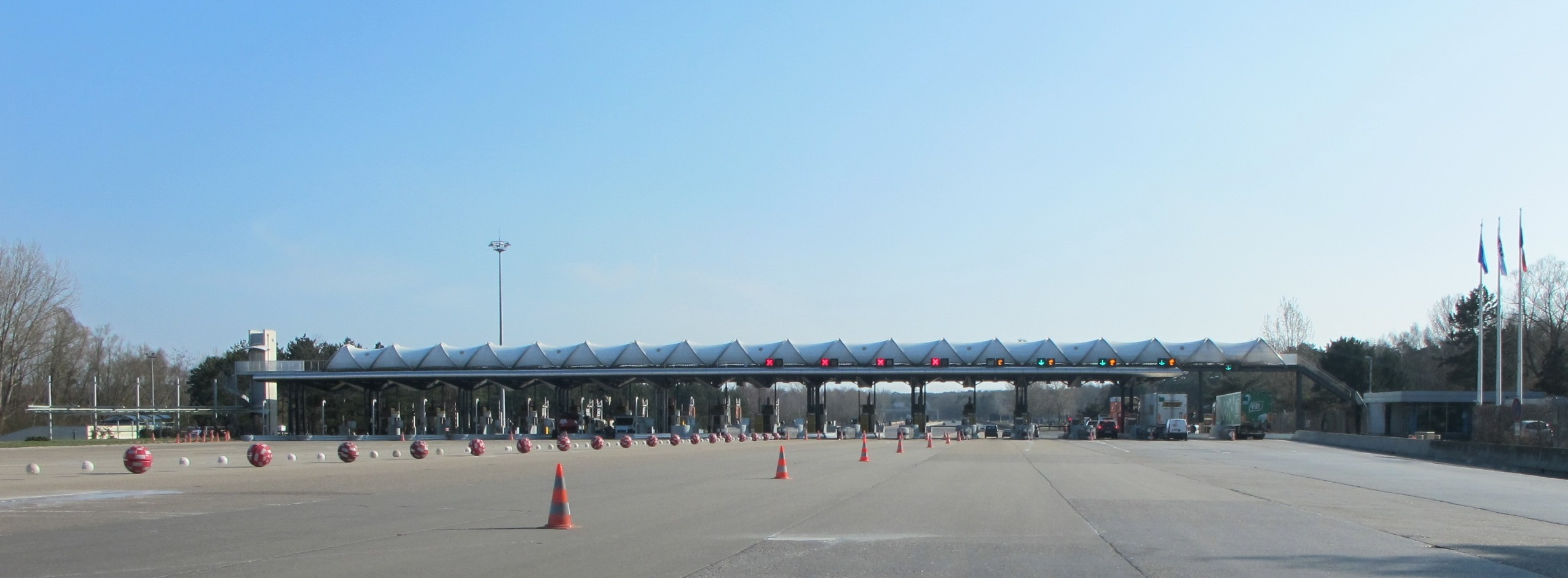 Autoroute A6 - France